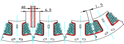 Darstellung des geöffneten Wickelraums für die Nadelwickeltechnik bei Zahnketten